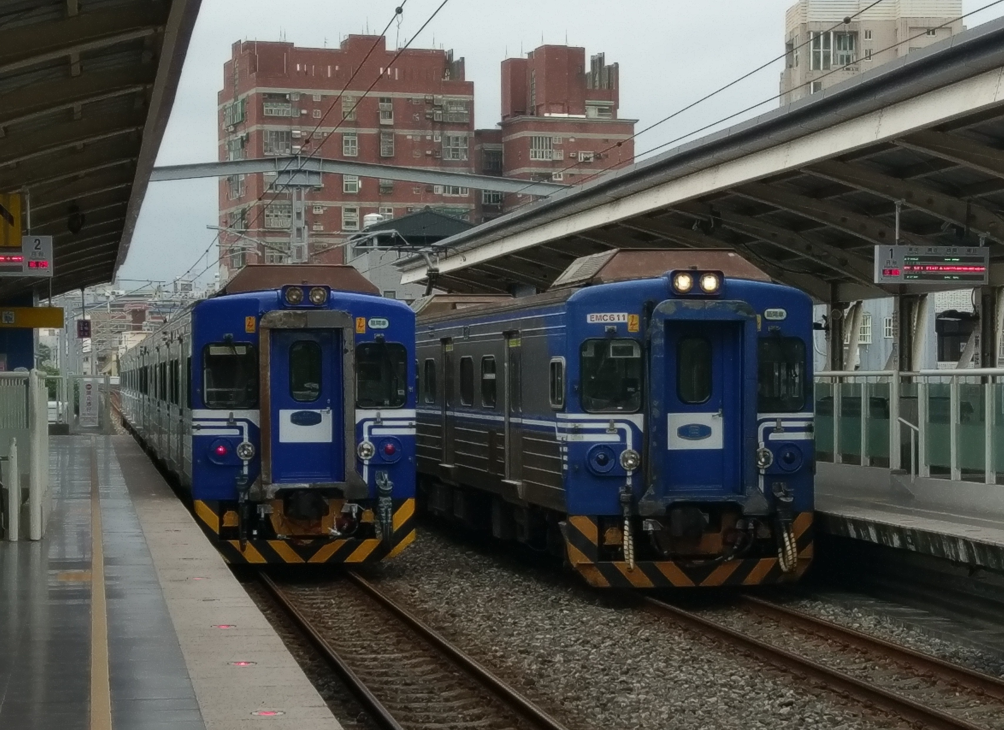 中文（台灣）: 臺灣鐵路管理局電聯車EMU516與EMU611停靠新莊車站。